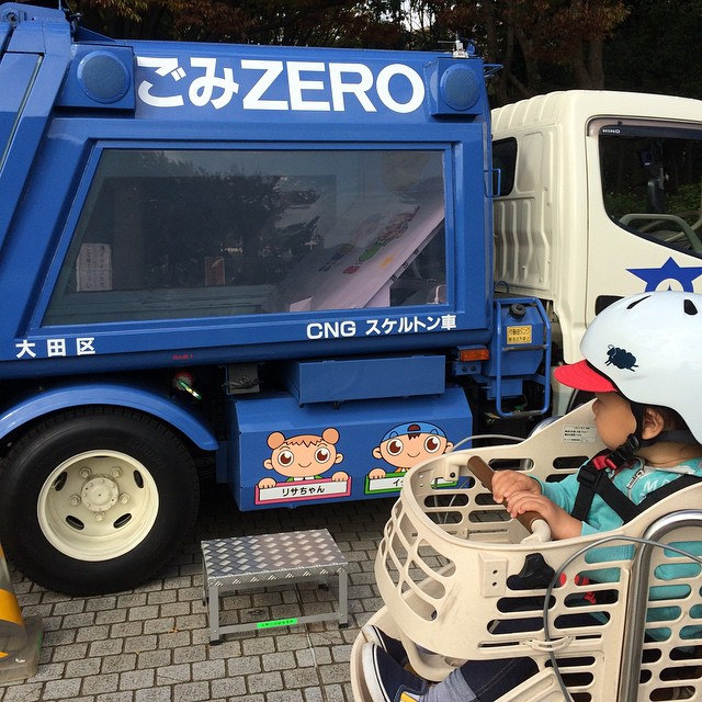 スケルトンごみ収集車！ （おとーちゃんは）初めて見た！